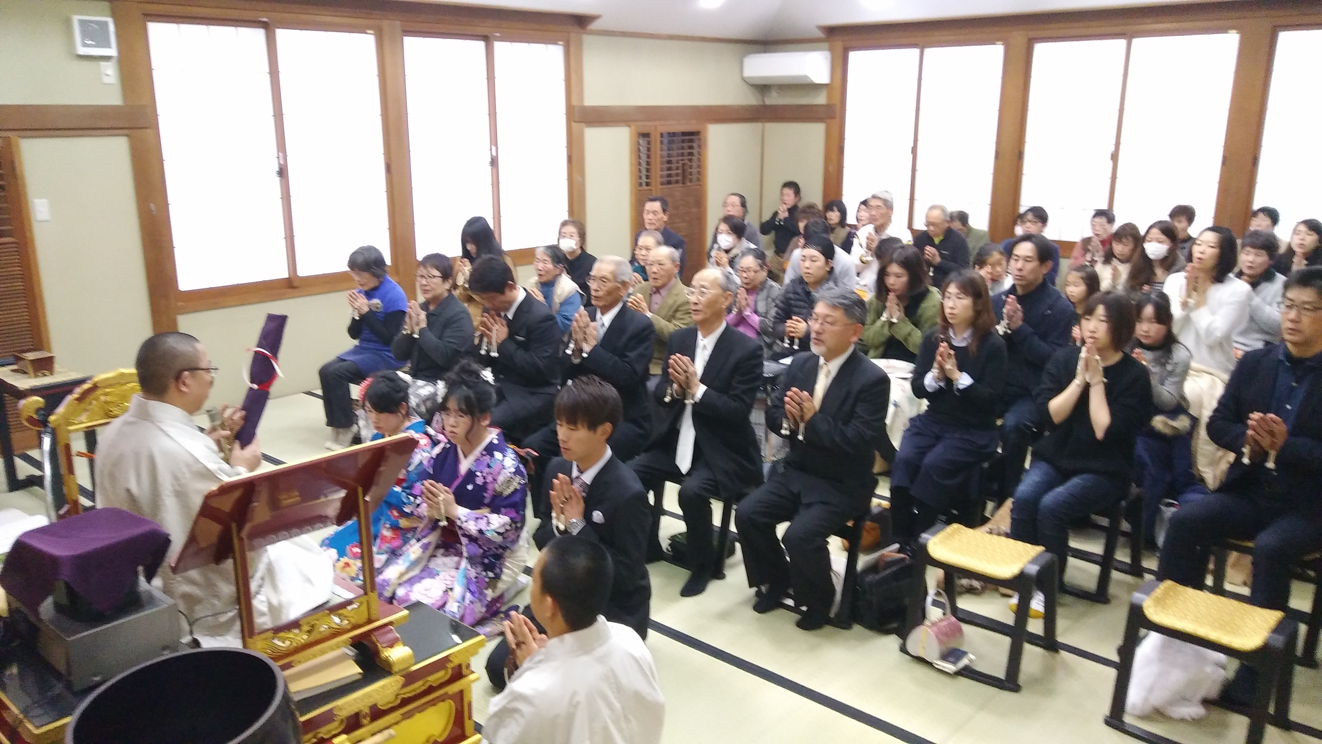 成人式の風景。